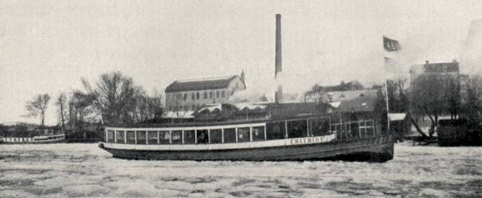 Ångslupen Frithiof. Byggd på Södra Varvet 1897 för Stockholms Ångslups AB till Stockholmsutställningen samma år. Därefter gick båten i reguljär trafik, huvudsakligen på Mälarens vatten, till 1950.